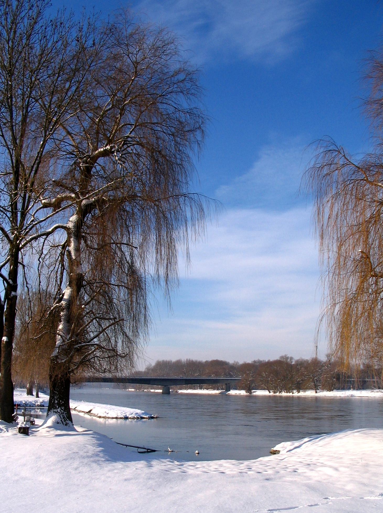 Neustadt an der Donau, Landkreis Kelheim, Niederbayern: In den 1990er an Stelle der "alten Brücke" errichtete neue Donaubrücke